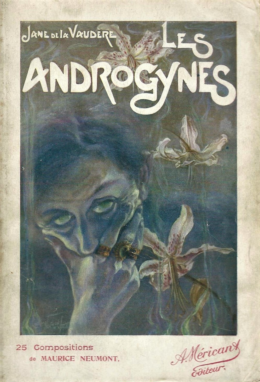 Couverture du roman Les Androgynes de Jane de La Vaudère ; illustration de Maurice Neumont.